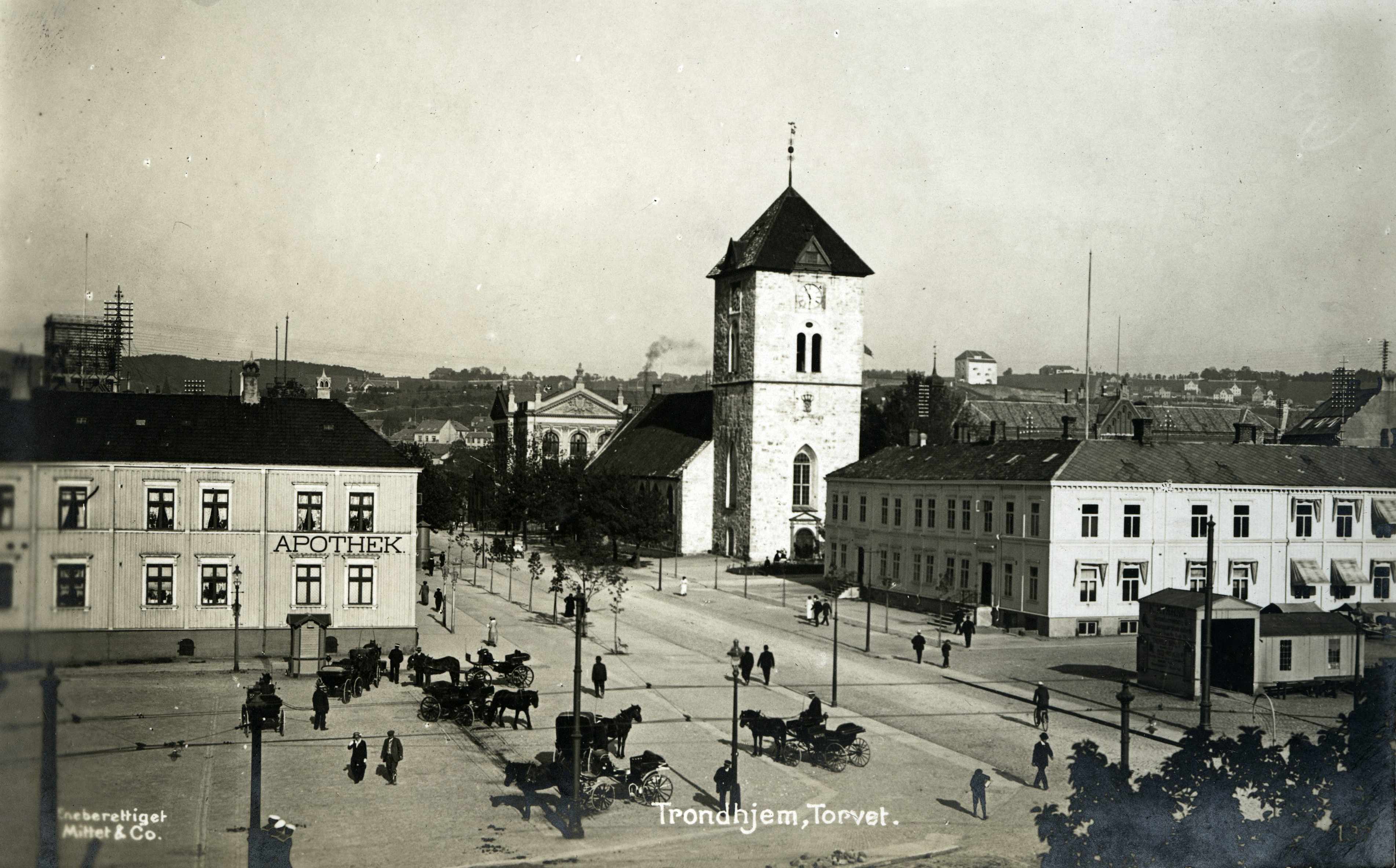 Format: Postkort. År: Tidlig 1900-tall, ca. 1910 - 1915. Foto: Mittet & Co.